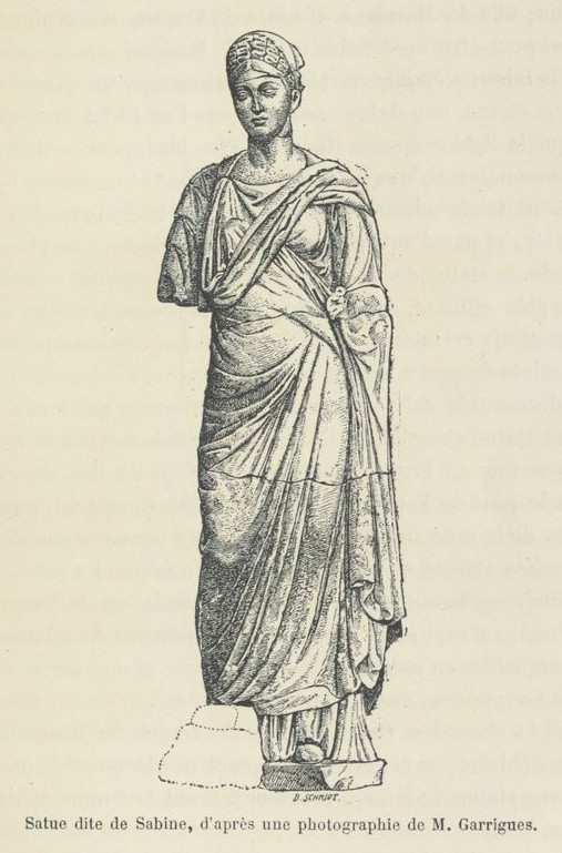 Mission à Carthage - statue de Sabine B Schmidt